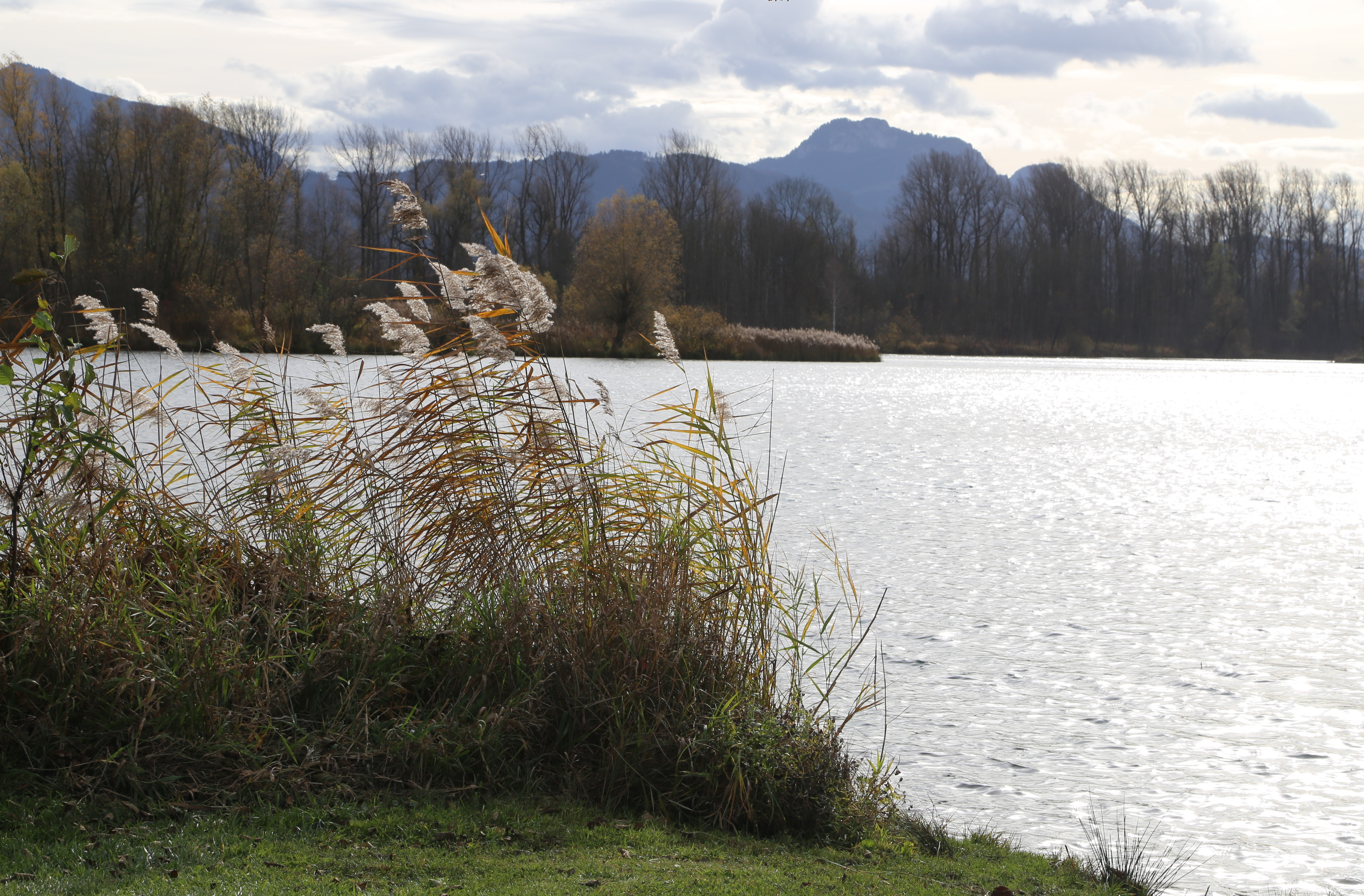 Happinger-Au-See, Rosenheim LSG Innauen-Süd (LSG-00516.01)